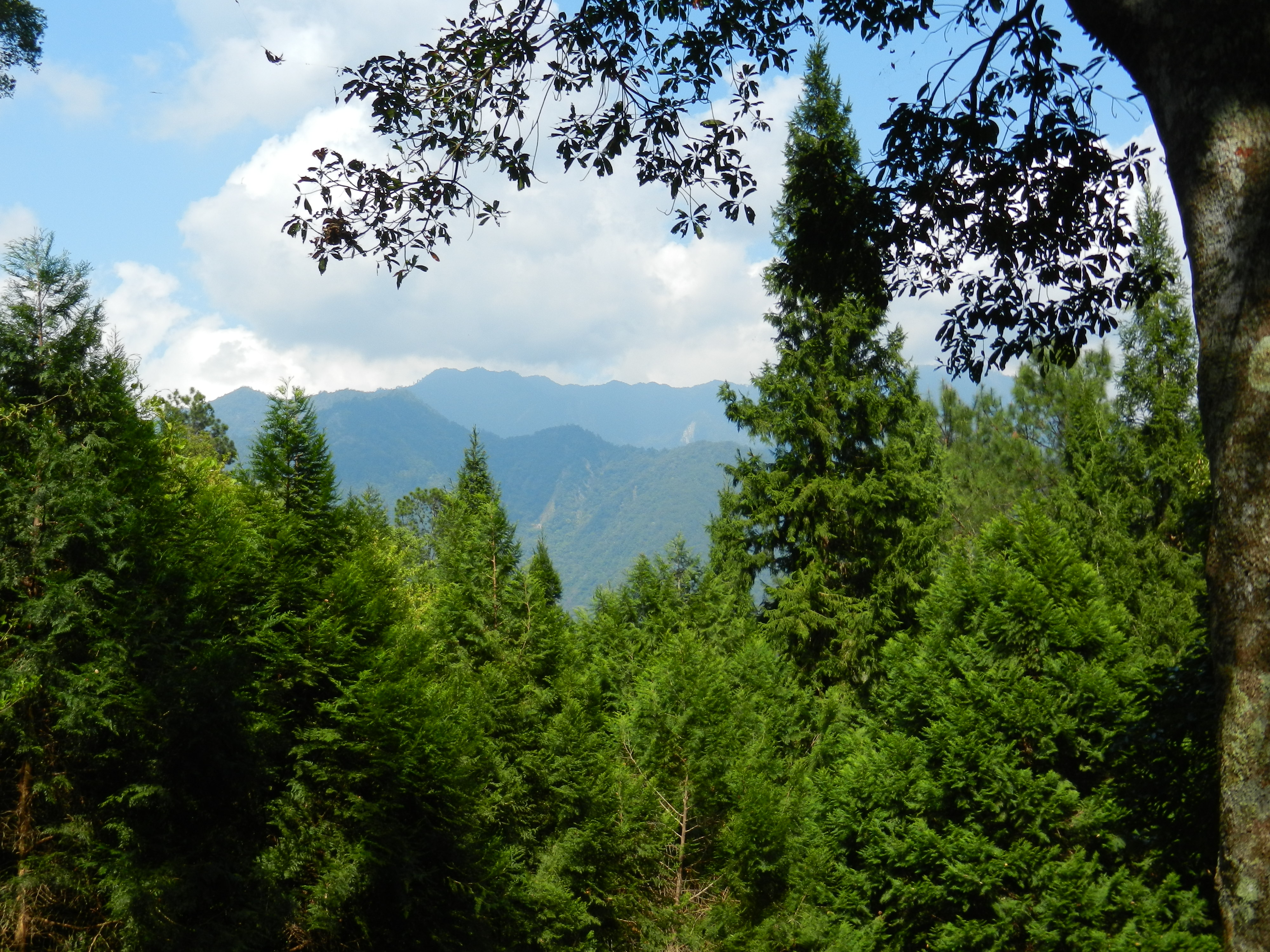 八仙山 Baxian Mountain